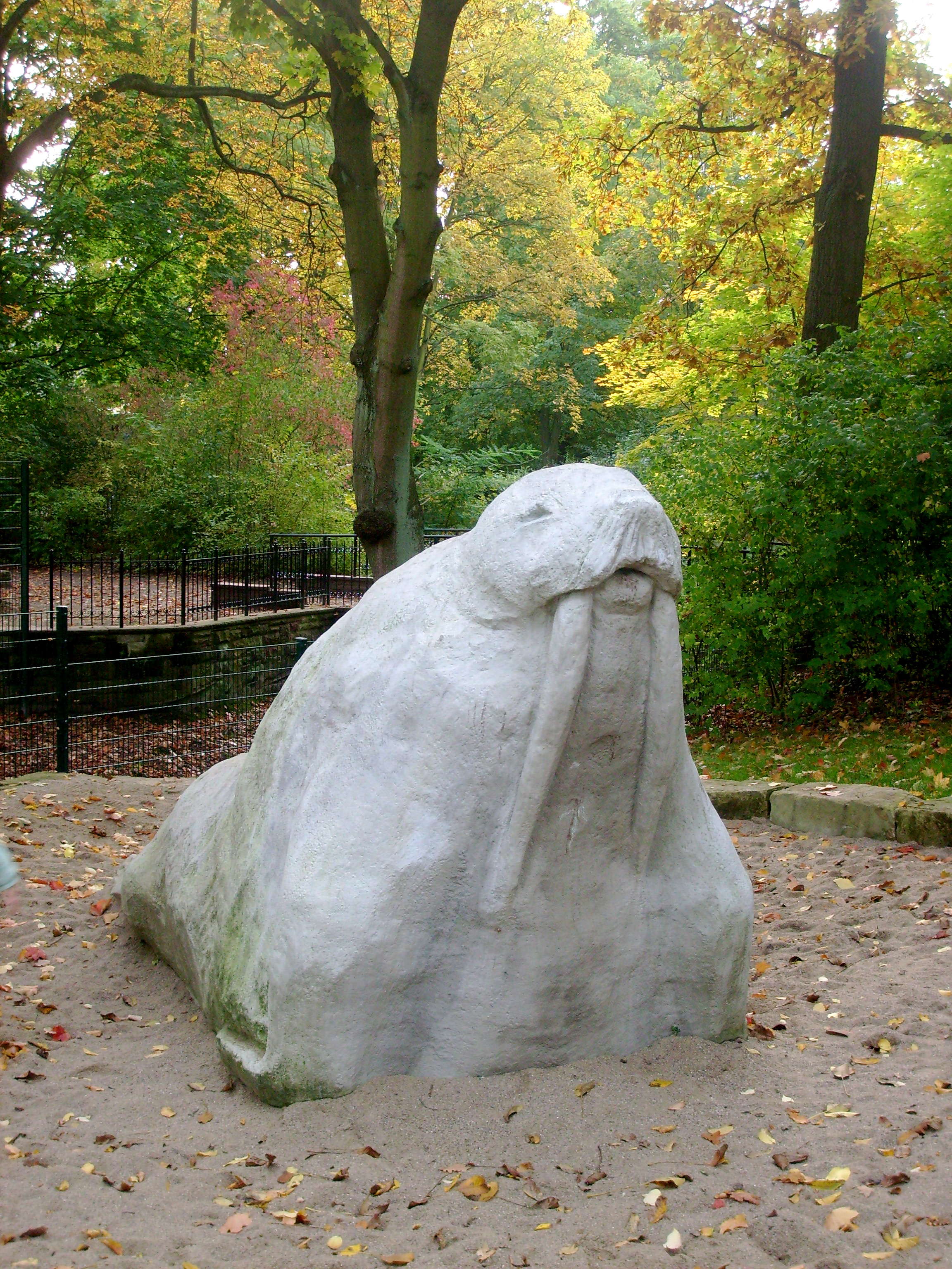 Statue des Hamburger Maskottchens "Antje" an einem Spielplatz nahe dem Bergedorfer Rathaus.